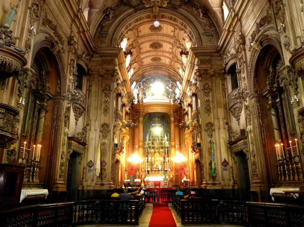 Igreja do Santíssimo Sacramento da Antiga Sé (Rio de Janeiro) Brasil